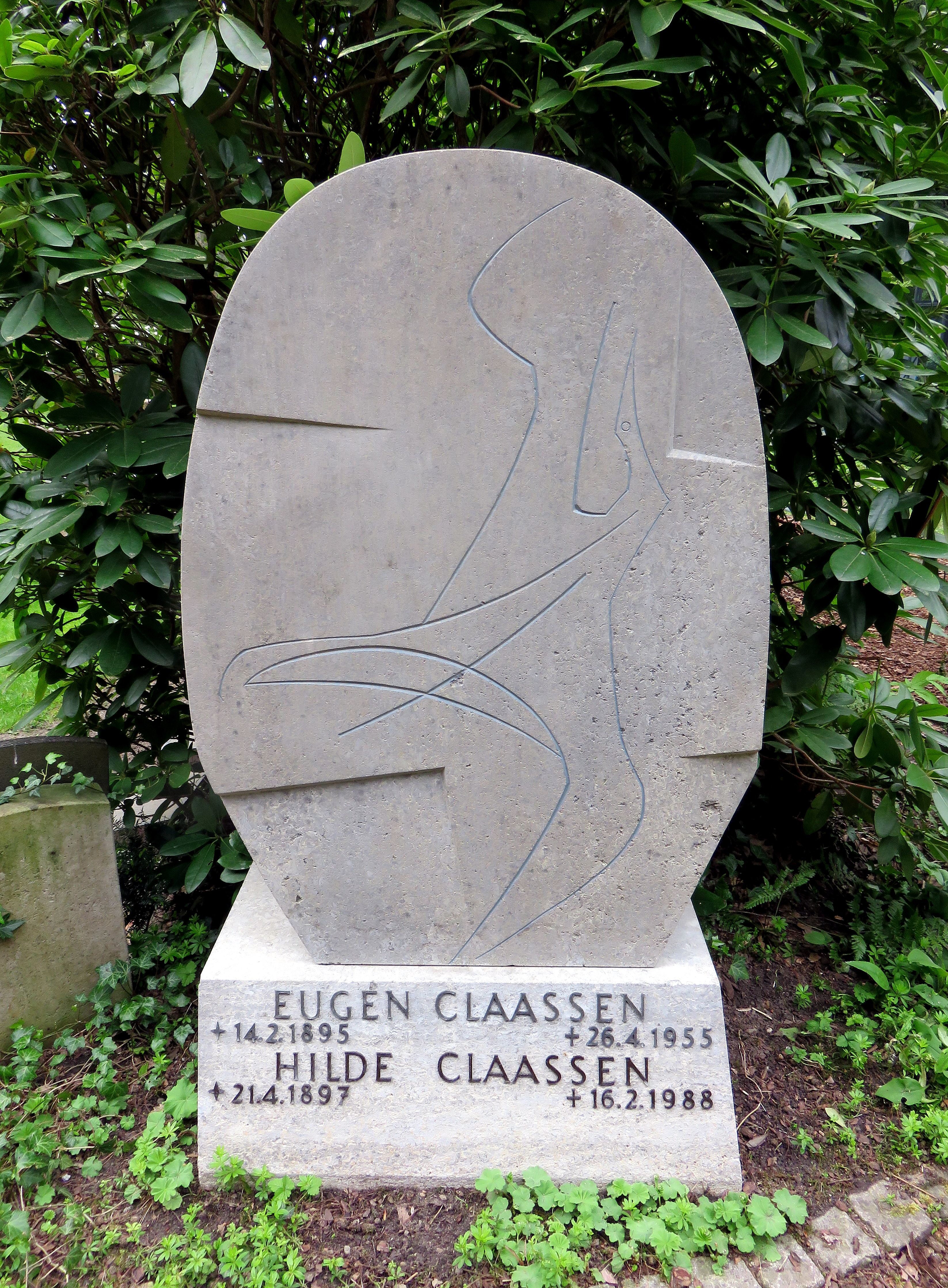 Historischer Grabstein der deutschen Kunsthistorikerin und Verlegerin Hildegard Claassen (und ihres Ehemannes, des deutschen Verlegers Eugen Claassen) im Bereich des Gartens der Frauen, hierher verlegt Ende April 2020 nach Ablauf der ursprünglichen Grabstätte. Der Grabstein wurde 1955 vom deutschen Bildhauer Hans Martin Ruwoldt geschaffen.